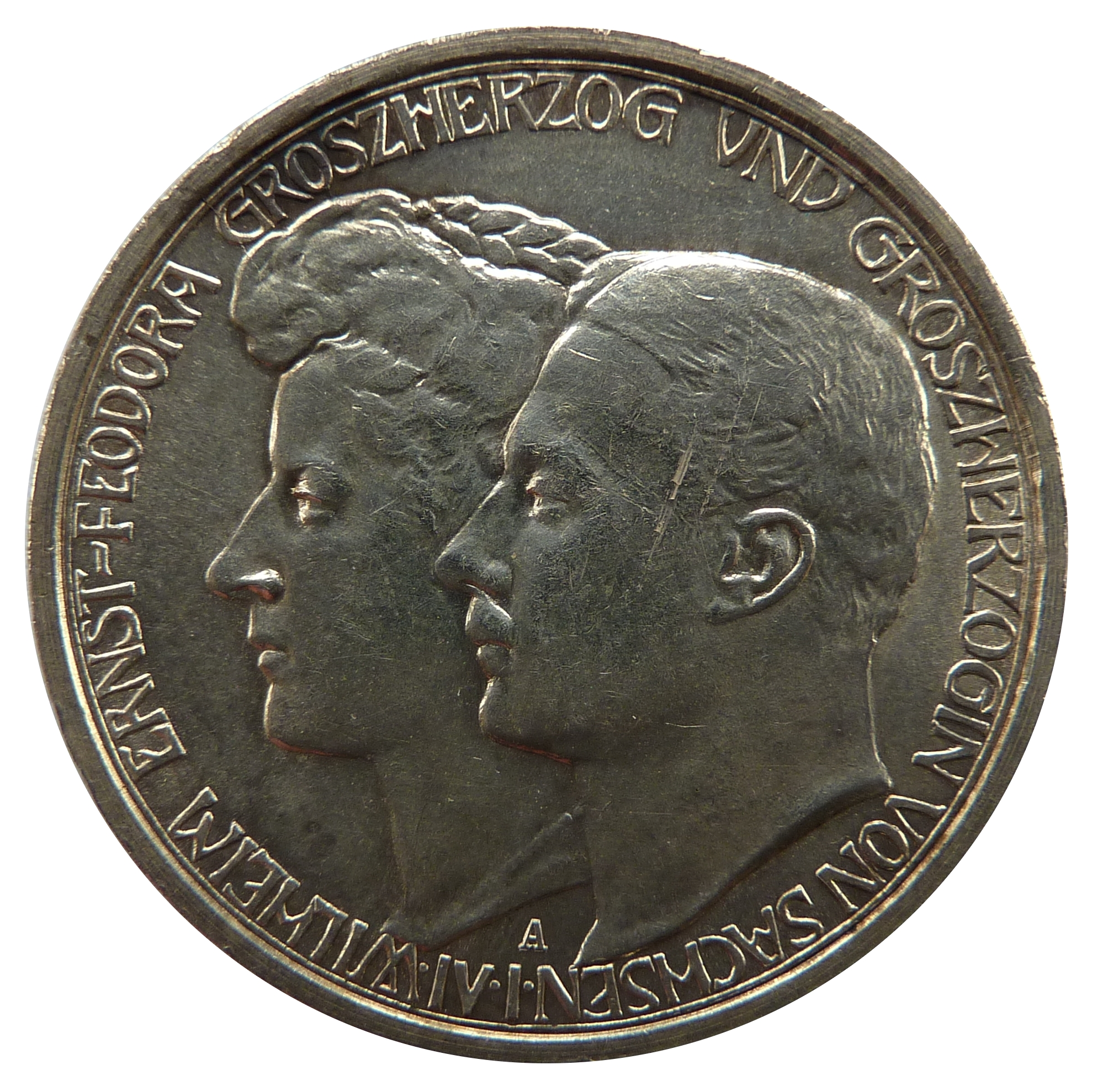 Vorderseite der 3-Mark-Gedenkmünze von Sachsen-Weimar-Eisenach anlässlich der Hochzeit des Großherzogs Wilhelm Ernst mit Feodora von Sachsen-Meiningen